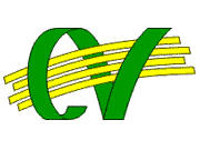 Logo des Cartellverbandes. Cartellverband der katholischen deutschen Studentenverbindungen